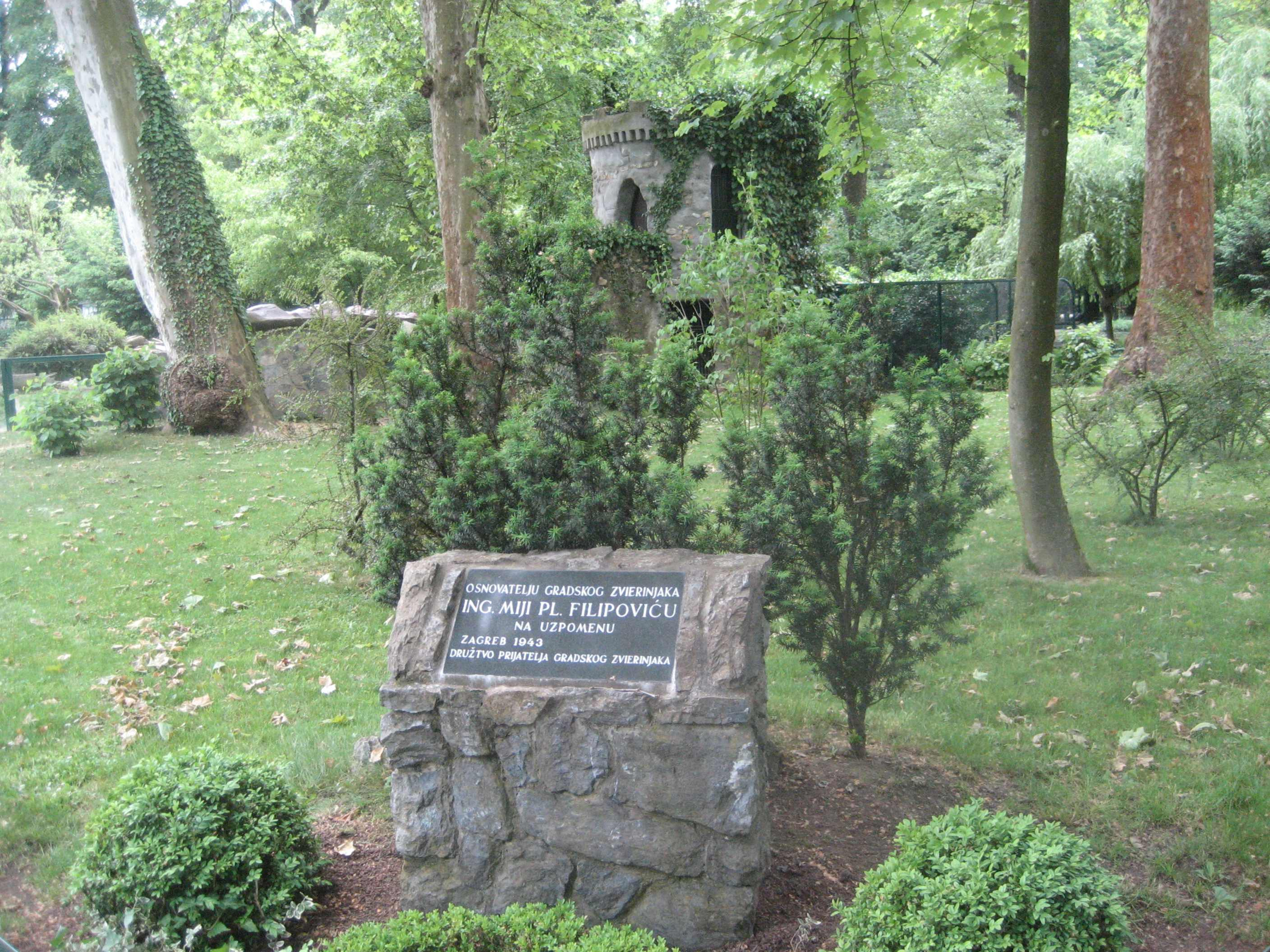 Zoo Zagreb1